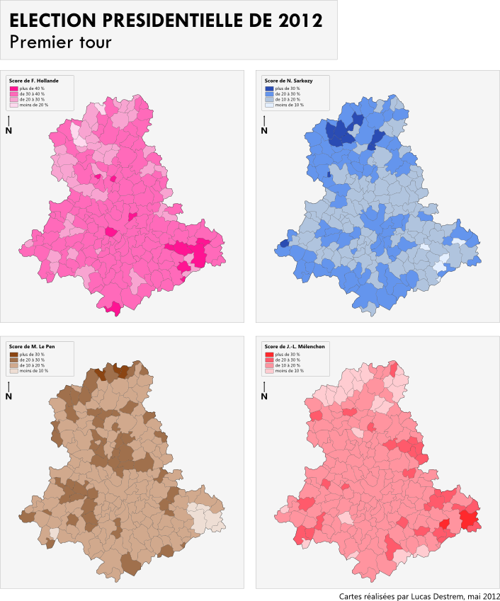 Carte des résultats par commune des 4 principaux candidats de l'élection présidentielle de 2012 en Haute-Vienne (1er tour)